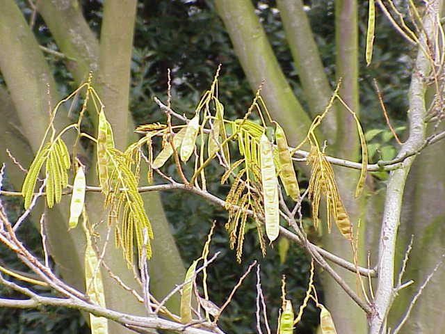 Species: Albiza julibrissin Family: Mimosaceae Image No. 1